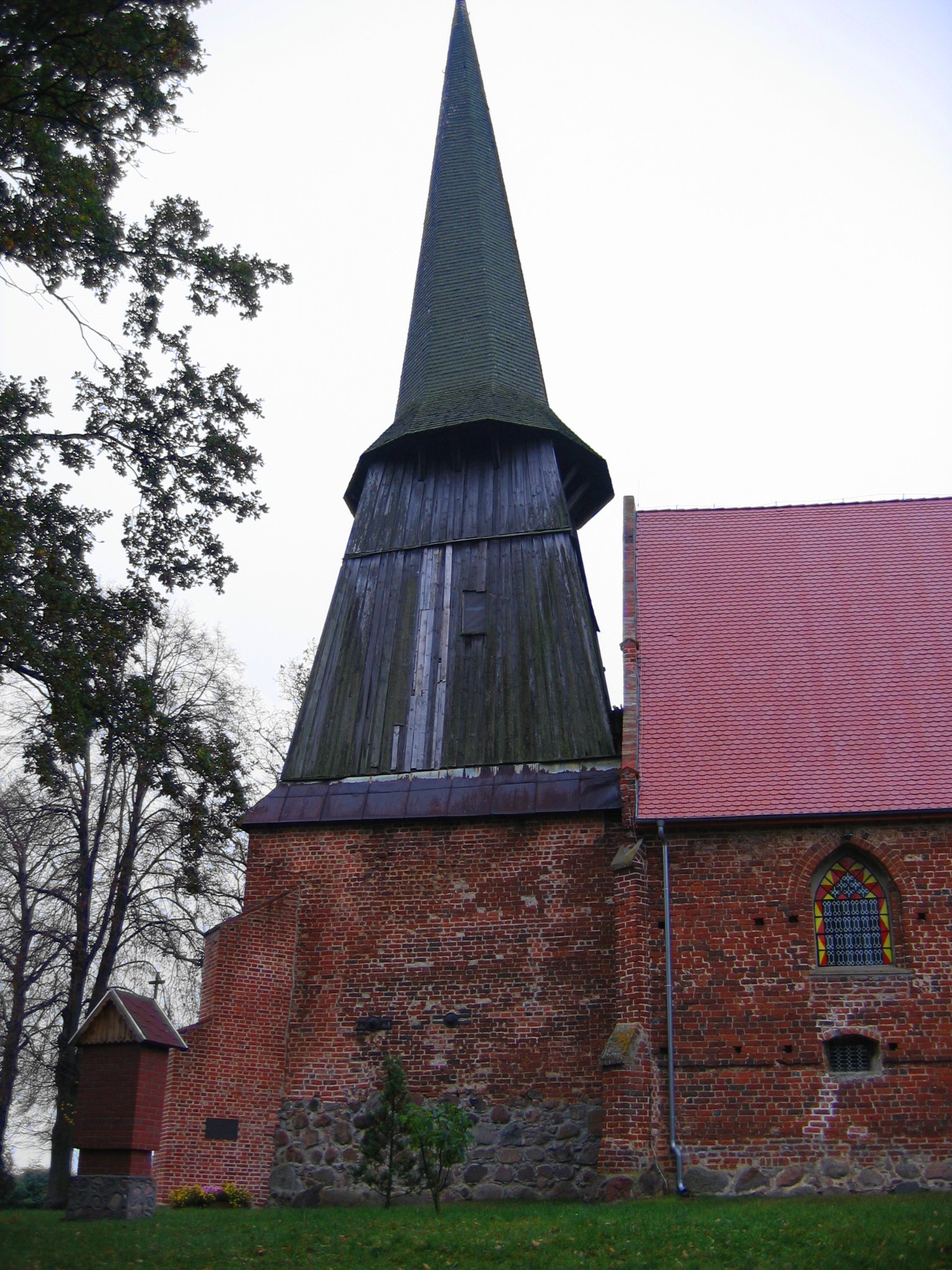 Cerkwica - rzymskokatolicki kościół parafialny p.w. Najświętszego Serca Pana Jezusa, XV (drewniana wieża)